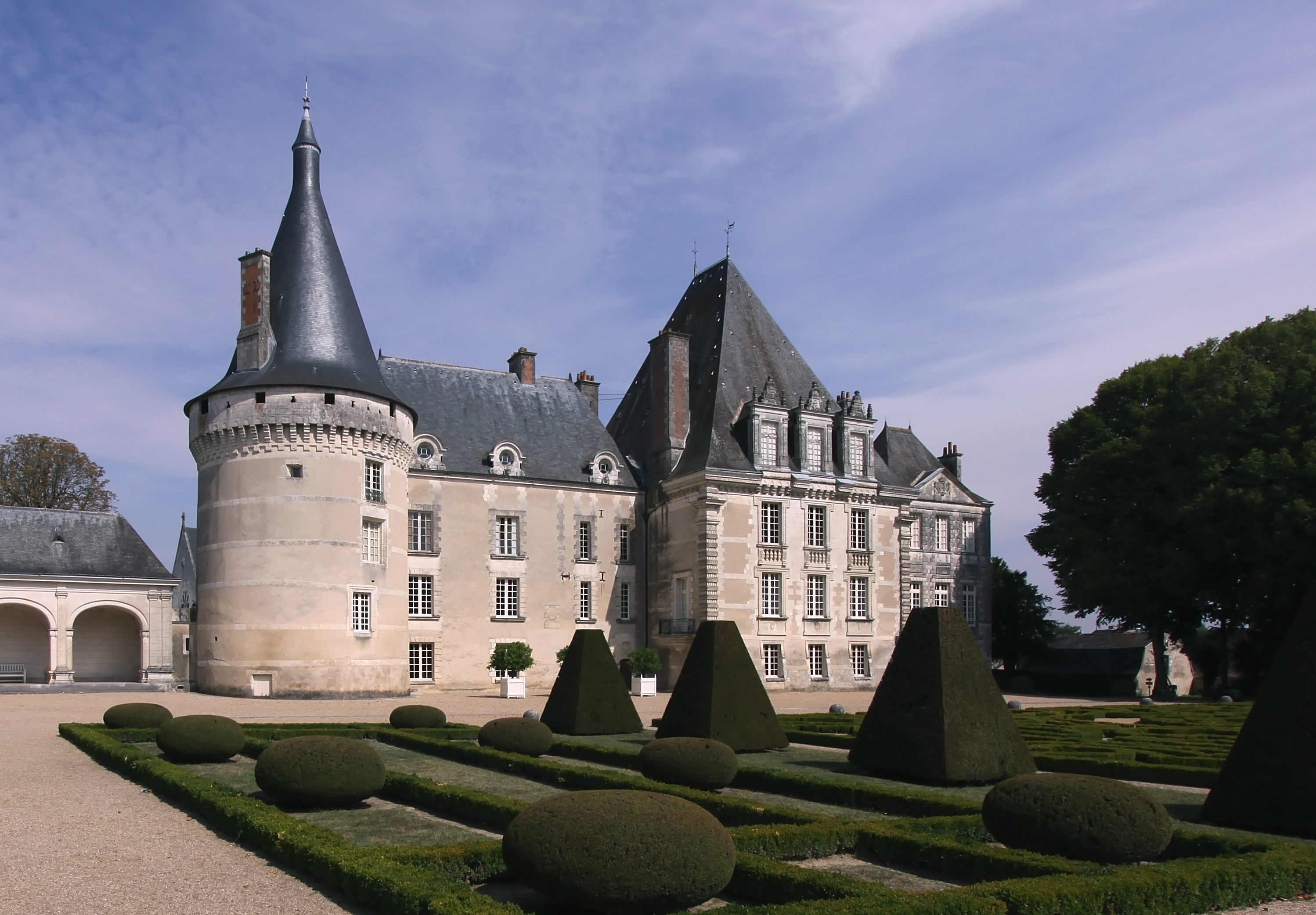 Schloss Azay-le-Ferron im französischen Département Indre